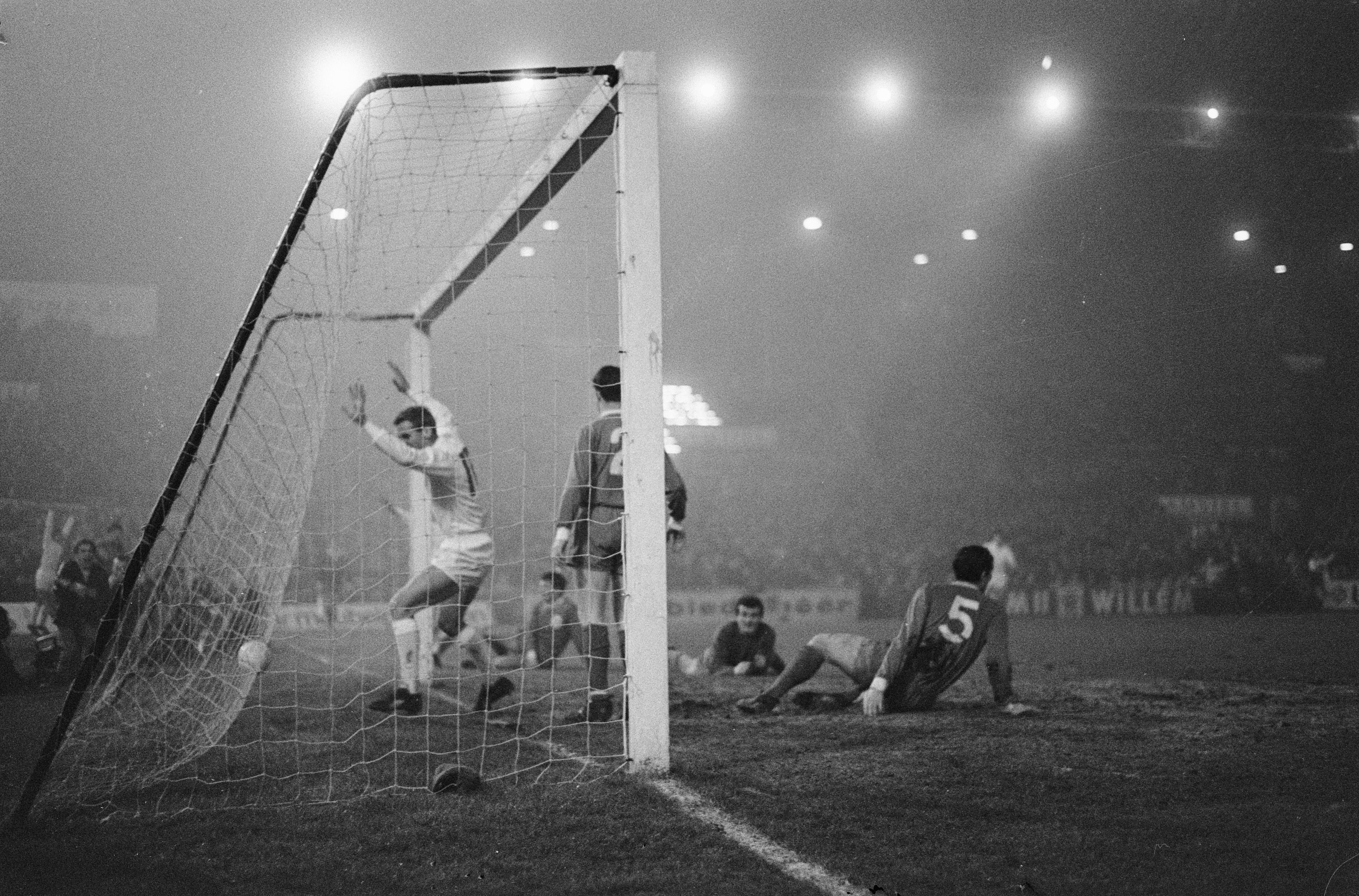 Collectie / Archief : Fotocollectie Anefo Reportage / Serie : [ onbekend ] Beschrijving : Europacup I. Ajax tegen Liverpool 5-1, Nuninga (juichend in doel) heeft 4-0 gemaakt Annotatie : Befaamde ´Mistwedstrijd´ Datum : 7 december 1966 Locatie : Amsterdam Trefwoorden : sport, voetbal Persoonsnaam : Nuninga, Klaas Fotograaf : Nijs, Jac. de / Anefo Auteursrechthebbende : Nationaal Archief Materiaalsoort : Negatief (zwart/wit) Nummer archiefinventaris : bekijk toegang 2.24.01.05 Bestanddeelnummer : 919-8569